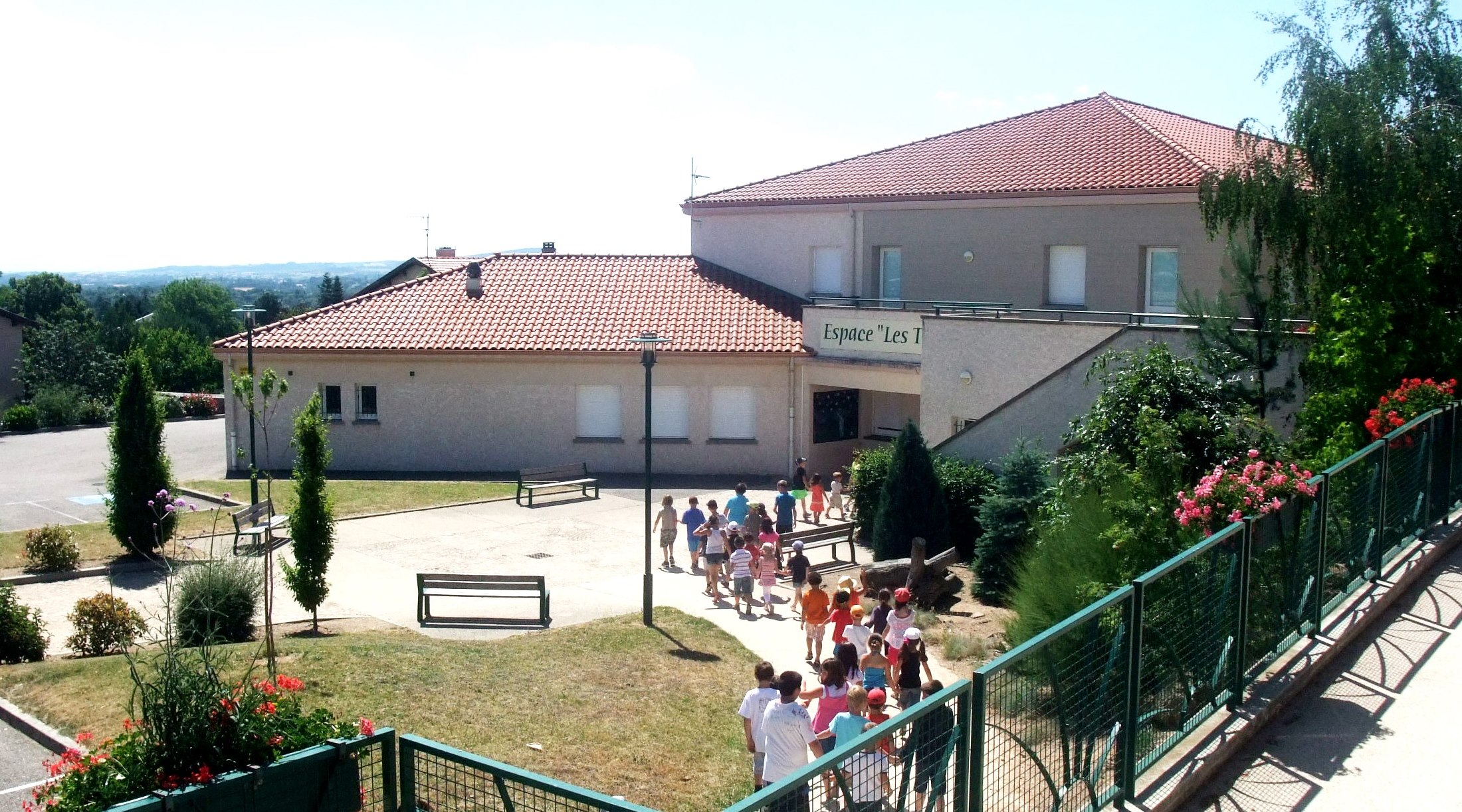 Roiffieux Les Termes enfants